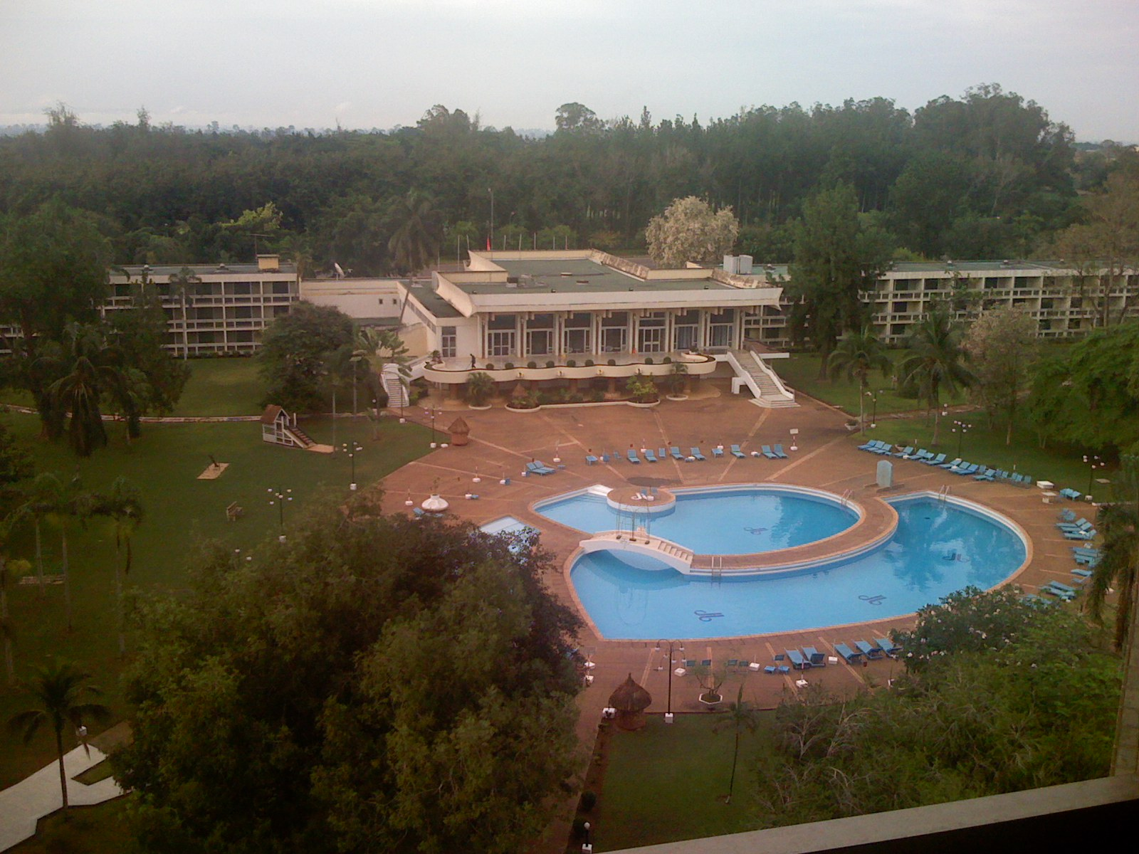 Hôtel Président à Yamoussoukro (Côte d'Ivoire)